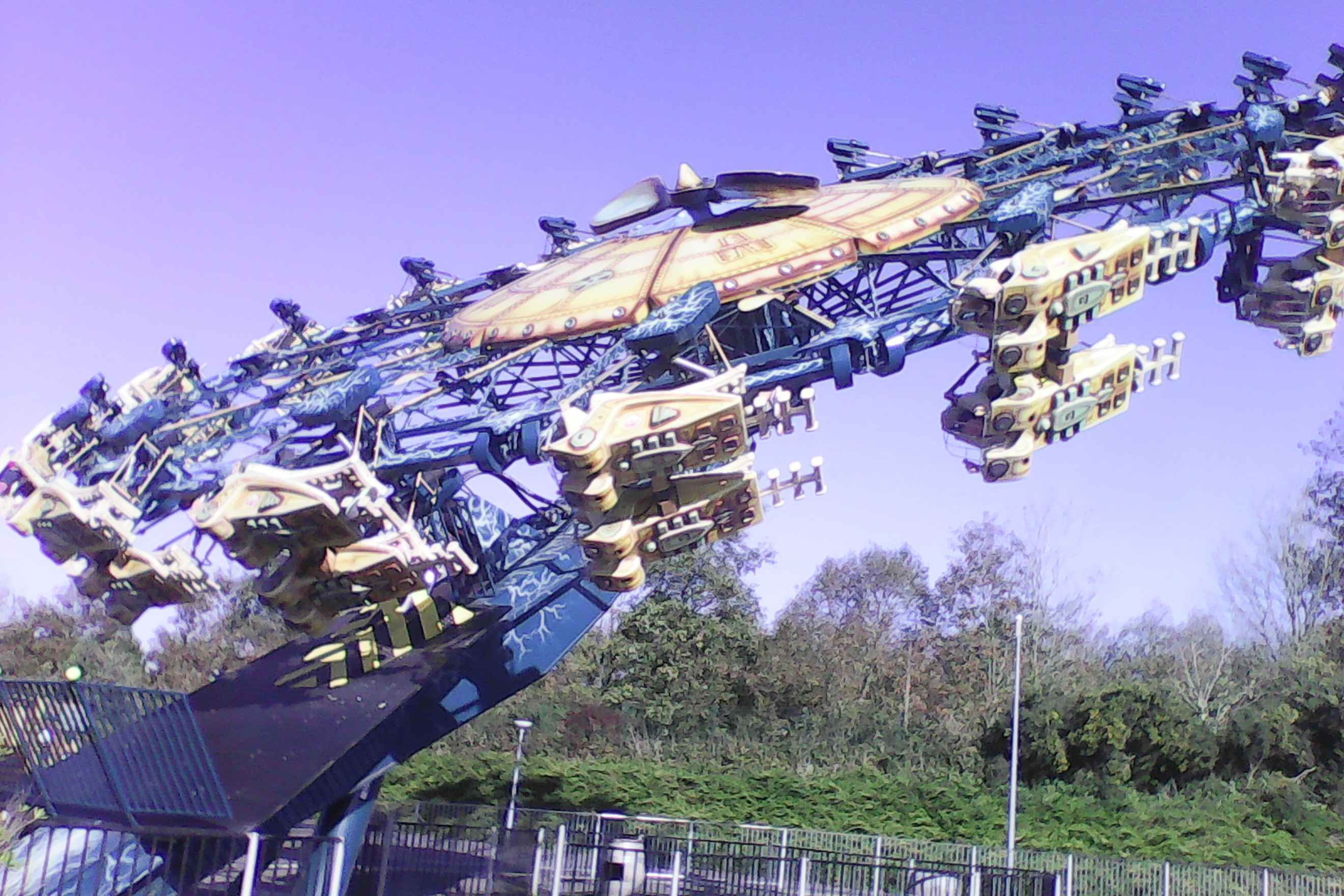 Récré des trois curés, le bateau